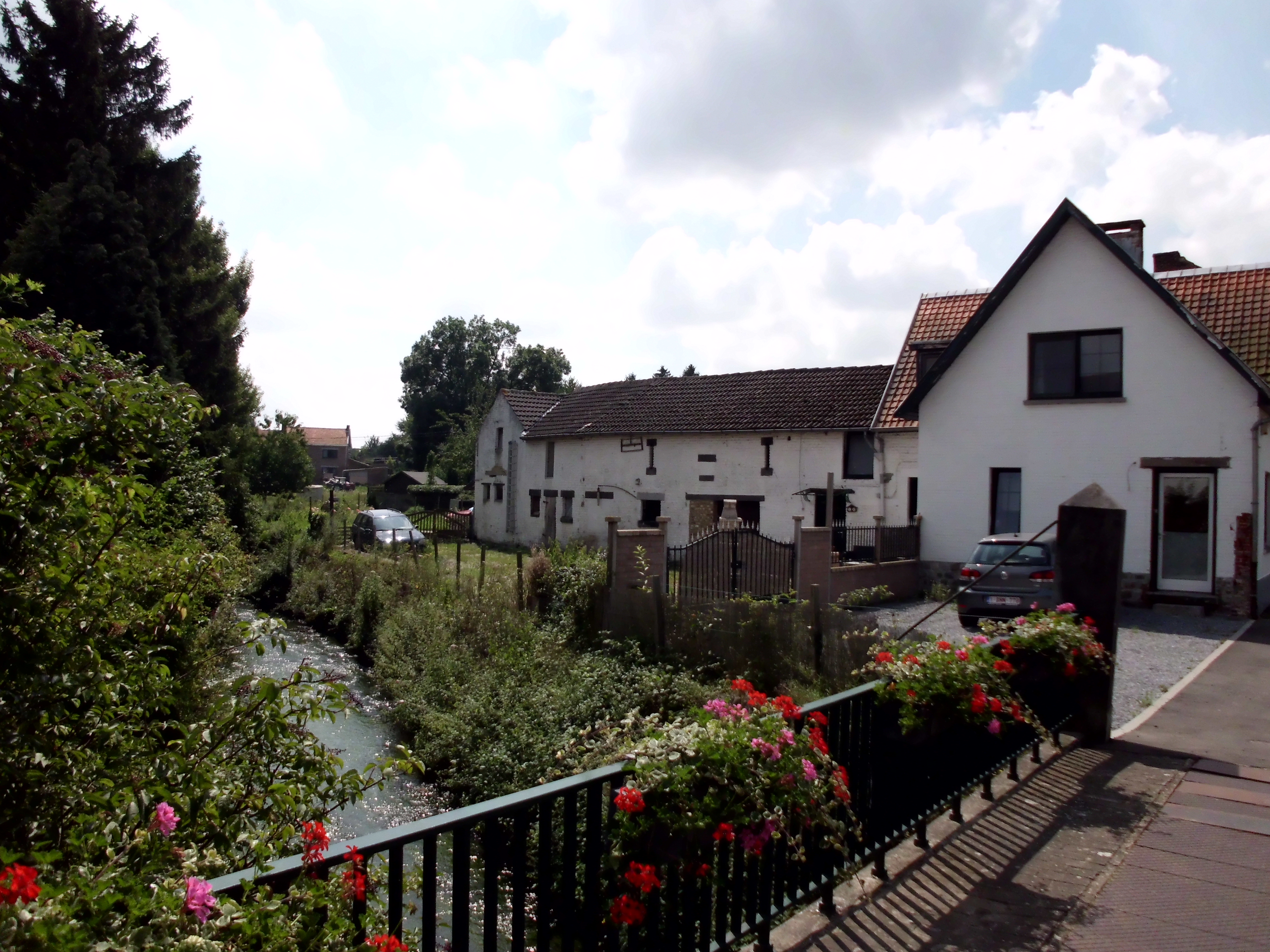 Oleye - Le Geer vers Lantremange, rue des Mayeurs